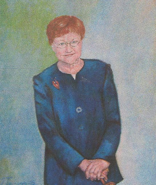 President Halonen